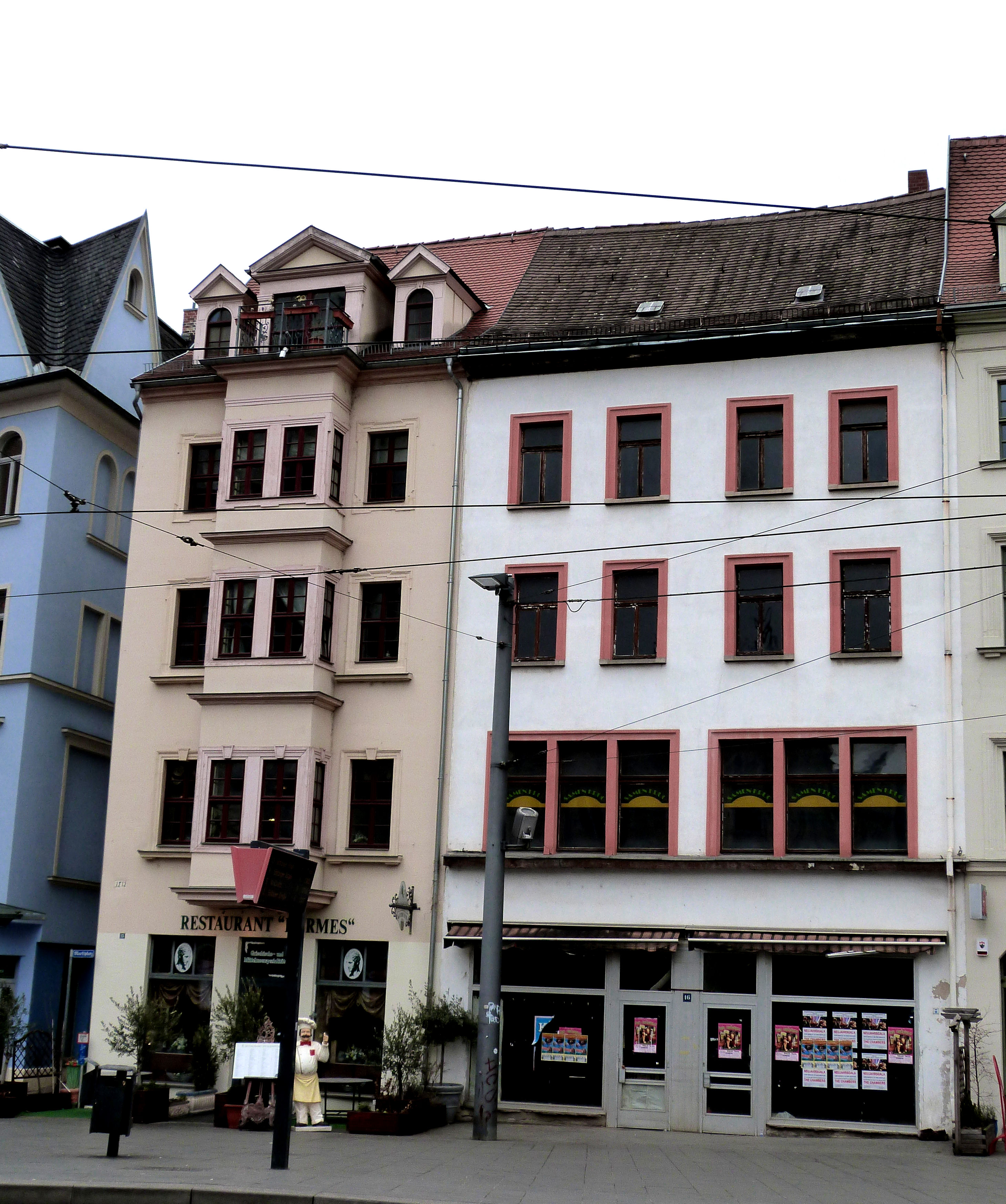 Häuser Markt 15 und 16, Halle (Saale), als ehemaliges Wohnhaus zum Komplex des Kühlen Brunnens gehörend